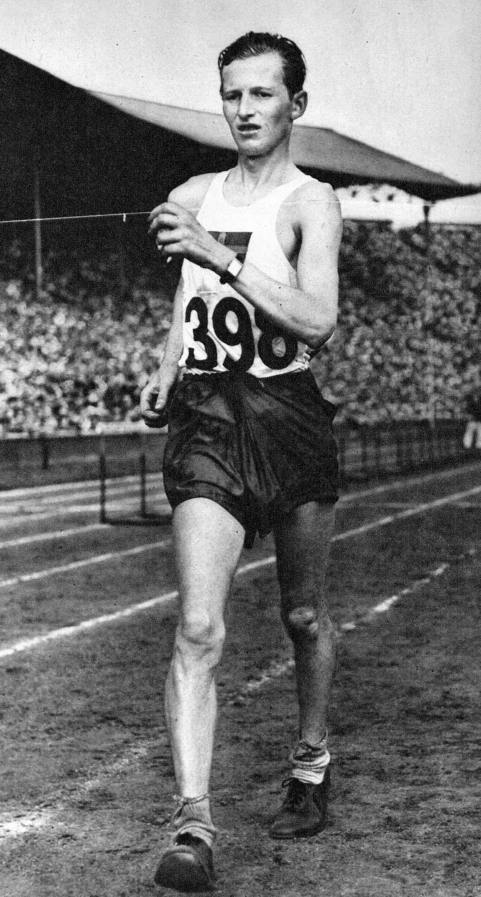 John Ljunggren (1919-2000)